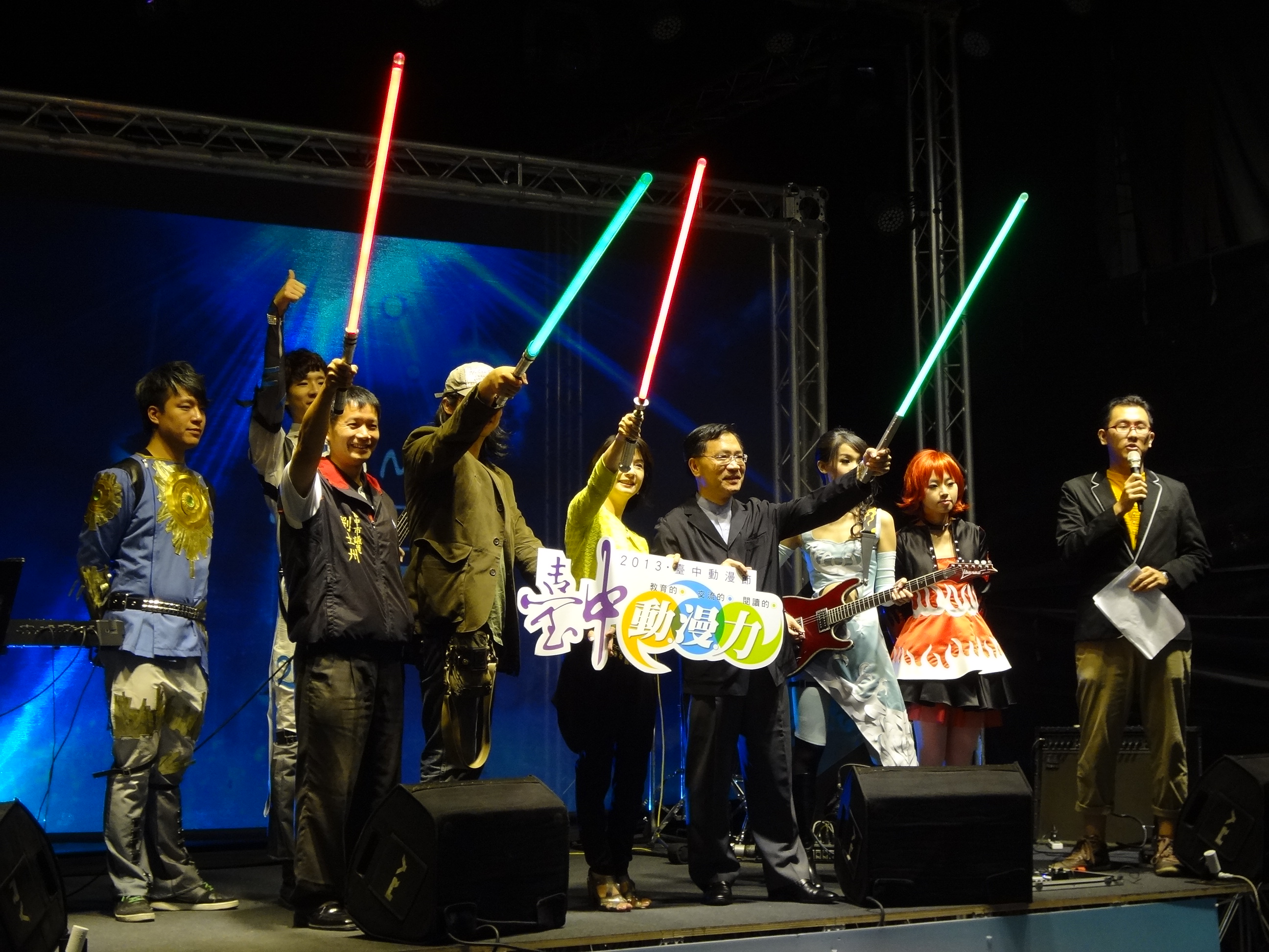 2013臺中動漫節開幕典禮，前排左三為臺中市政府文化局局長葉樹姍。